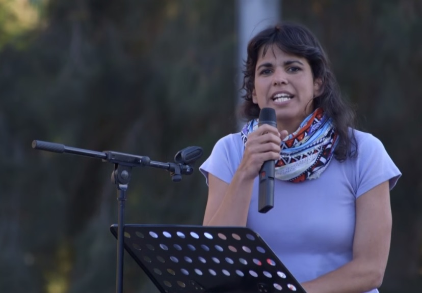 Intervenció de Teresa Rodríguez, diputada de Podem al Parlament d'Andalusia, a l'acte central de campanya el dissabte 16 de maig del 2015 a plaça Catalunya.